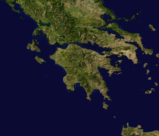 Ausschnitt aus Blue Marble-Karte der NASA, das südliche Griechenland mit der Halbinsel Peloponnes zeigend.